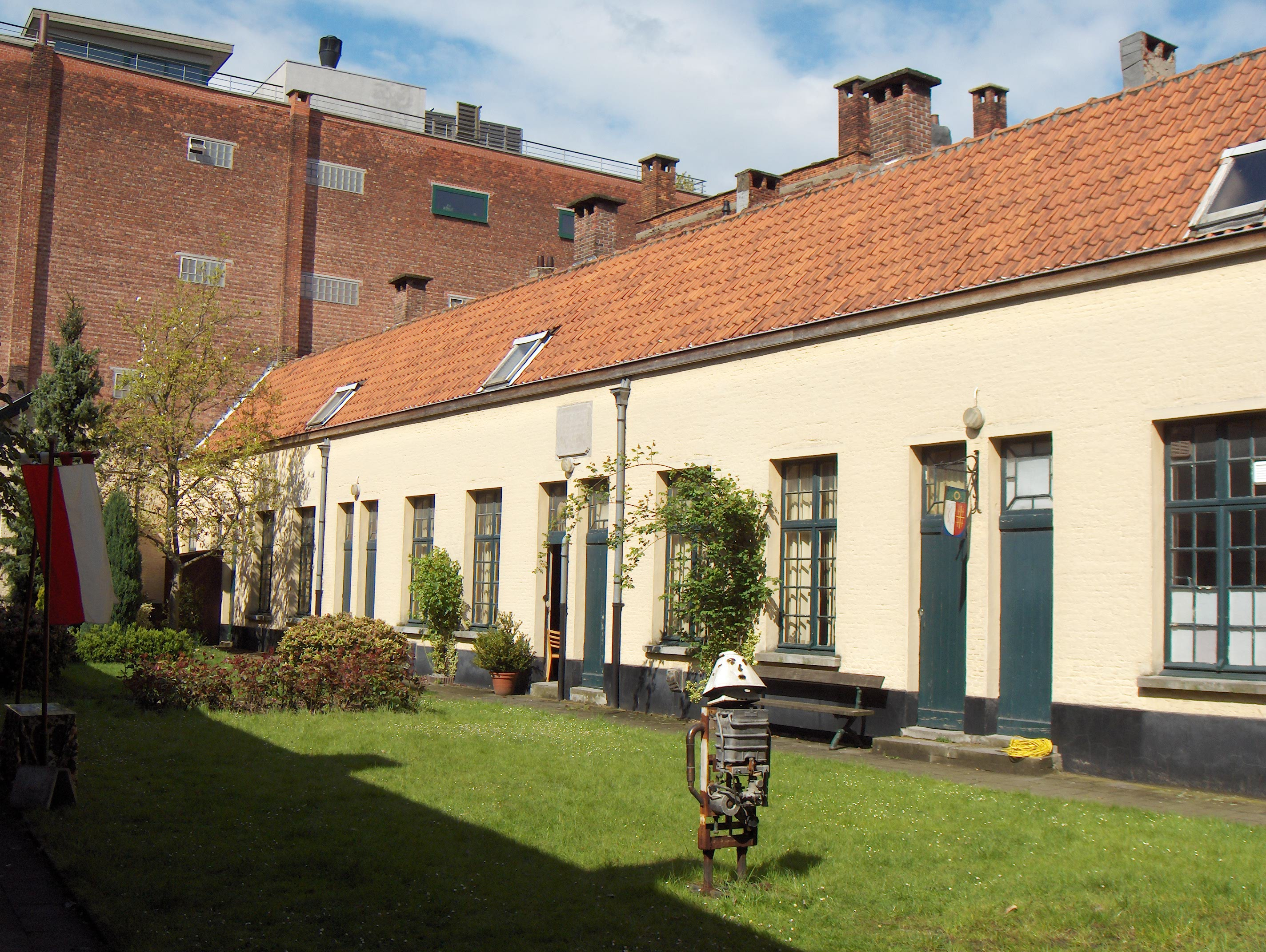 Beschreibung: Antwerpen, Godshuis "Jan Van der Biest" am Falconrui 33. Datum: 30. April 2006 Fotograf: Friedrich Tellberg